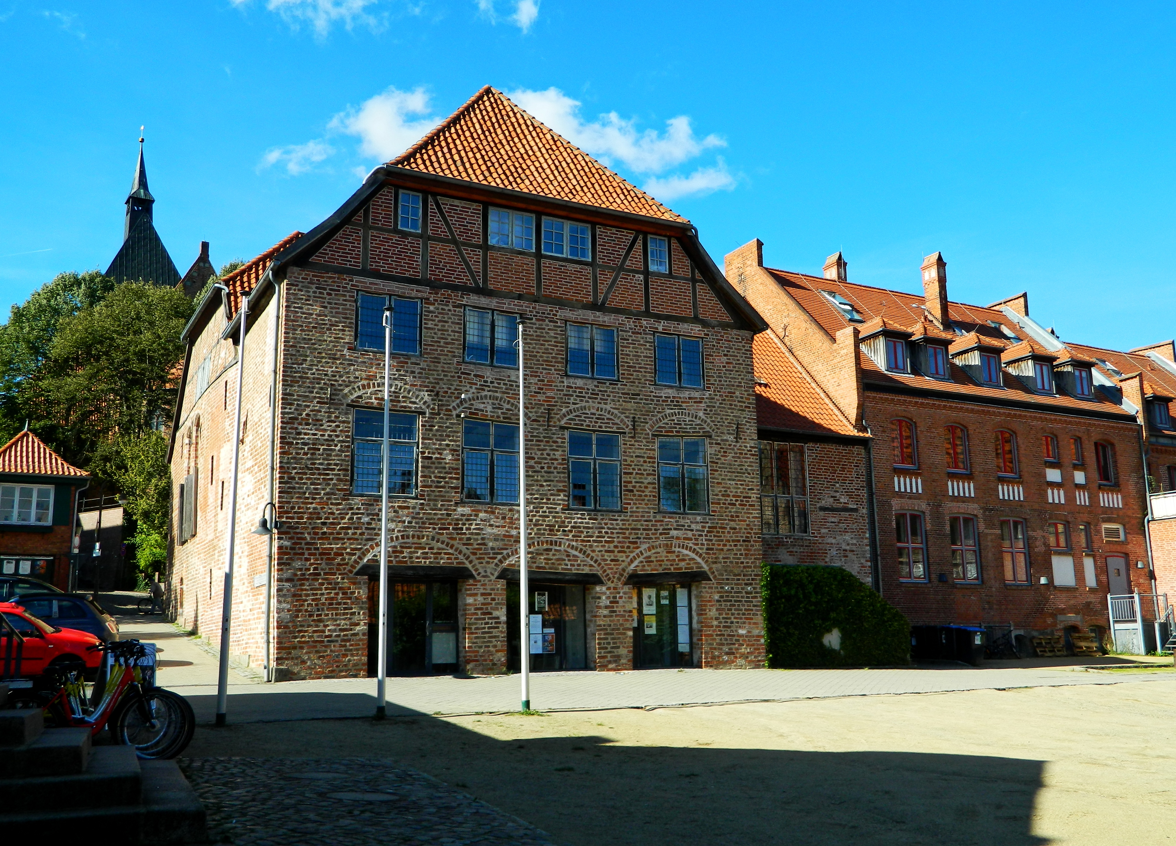 Hauptmannshaus (1414 errichtetes Wohn u. Amtsgebäude der Lübeker Stadthauptleute)